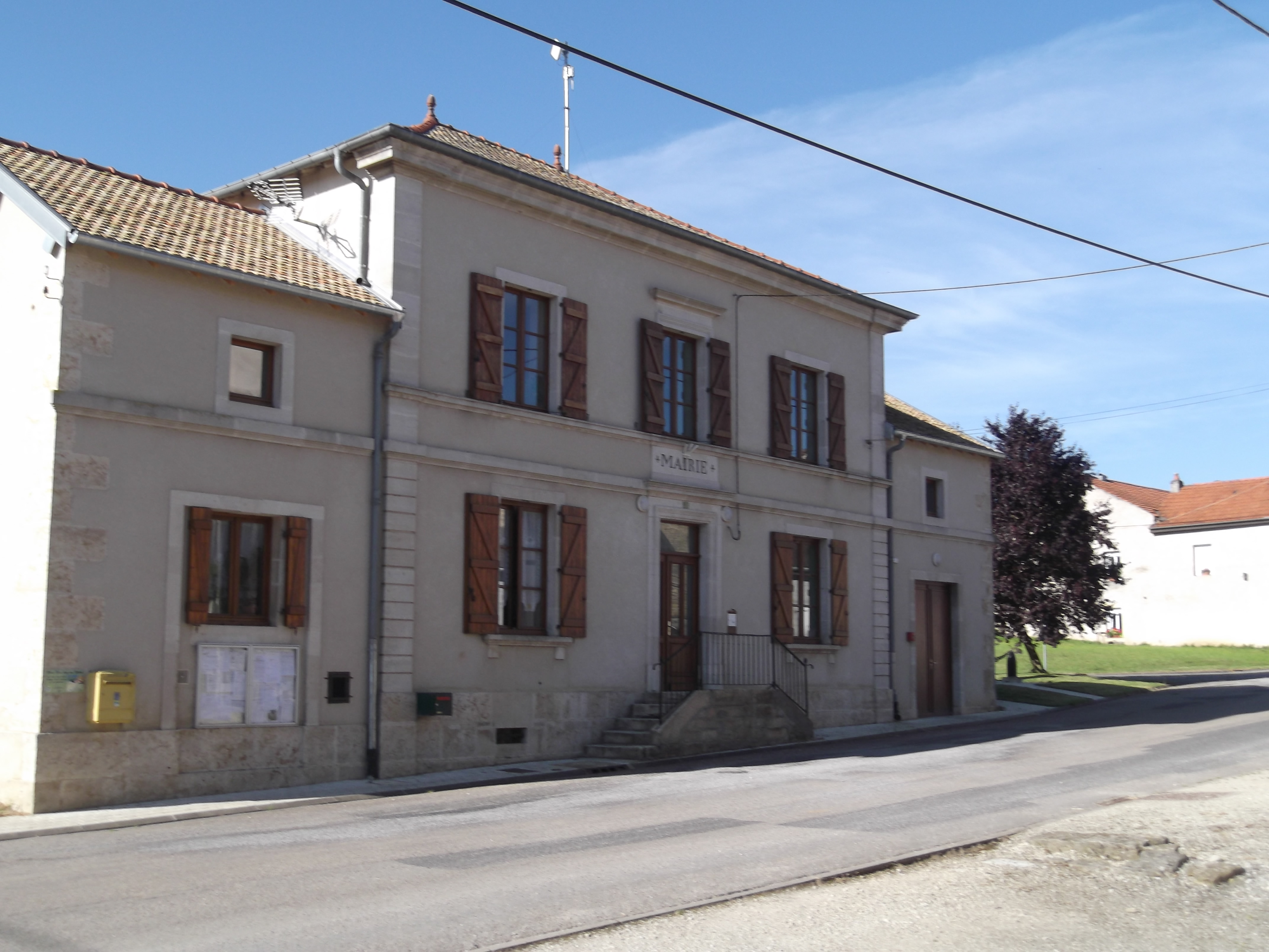 Mairie